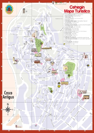 Plano del municipio